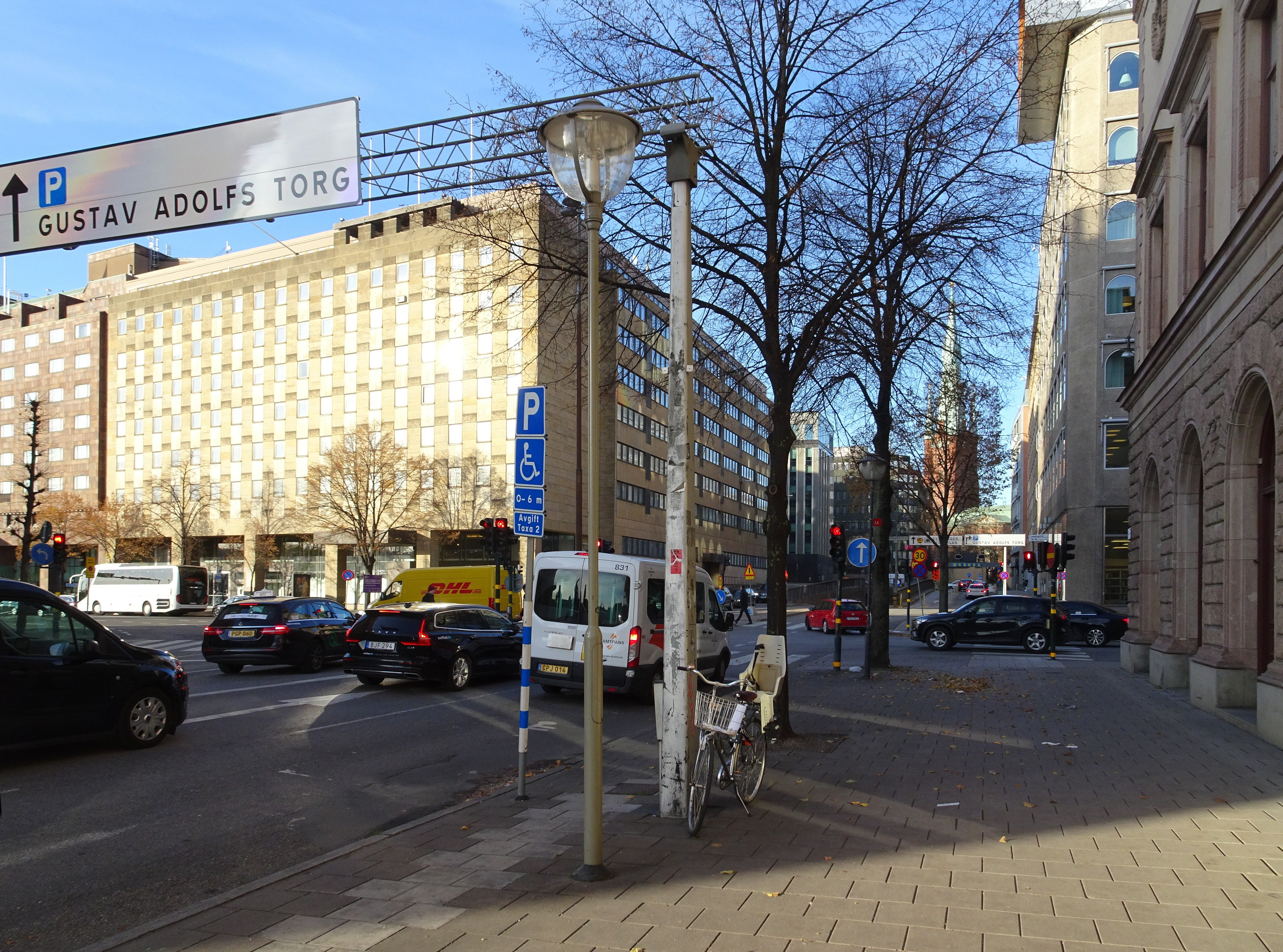 Rödbodgatan mot norr med fastigheten Snäckan 8 t.v.